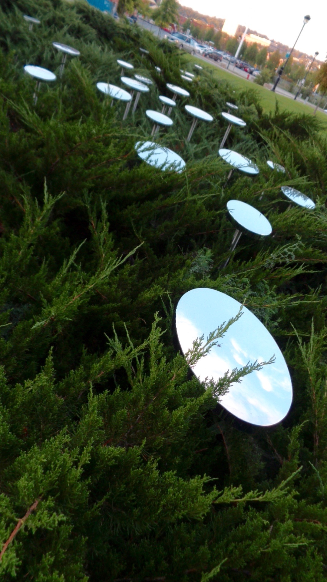 Originaire de la Gaspésie, mais vivant à Gatineau, Marie-Josée Coulombe a créé l’œuvre Les Ciels inversés lors de la construction du Centre des arts de la scène Jean-Besré, en respect de la Politique d’intégration des arts à l’architecture et à l’environnement des bâtiments et des sites gouvernementaux et publics du gouvernement du Québec. Les ciels inversés est une œuvre constituée de 29 plaques ovales en acier, montées sur des tiges tubulaires, installées dans un environnement paysager conçu par l’artiste. Ces surfaces réfléchissantes se présentent sur un plan horizontal, laissant une impression visuelle de flottement dans l’espace. En marchant tout autour de l’œuvre, les plaques ovales réfléchissent l’image fragmentée du firmament, l’image inversée de l’architecture et des paysages environnants. Il s’agit d’une œuvre qui se transforme en temps réel lors de nos déplacements et selon les changements climatiques. Voilà une remarquable réussite d’intégration, à proximité du Centre des arts de la scène Jean-Besré, un lieu de production des artistes de la scène, dont l’expérience artistique porte justement sur le corps et ses mouvements.